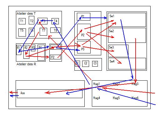 Michel Leff